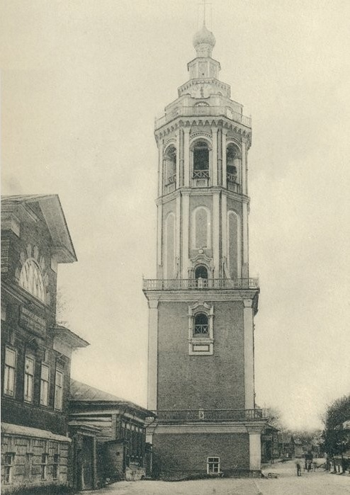 Николо-Зарецкий храм